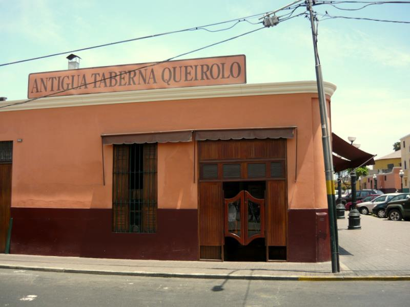 Uno de los bares más tradicionales de Lima. Pueblo Libre, Lima, Perú.